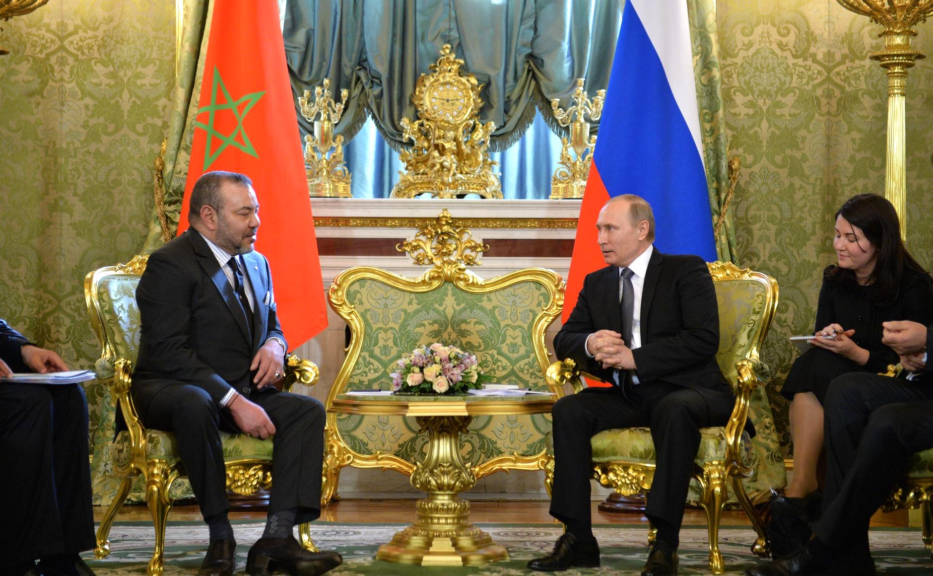 Встреча Президента России Владимира Путина с Королём Марокко Мухаммедом VI